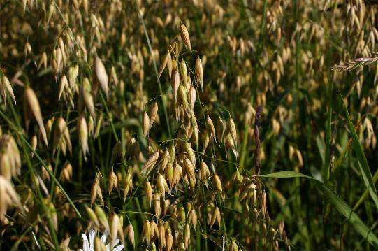 Avena sativa